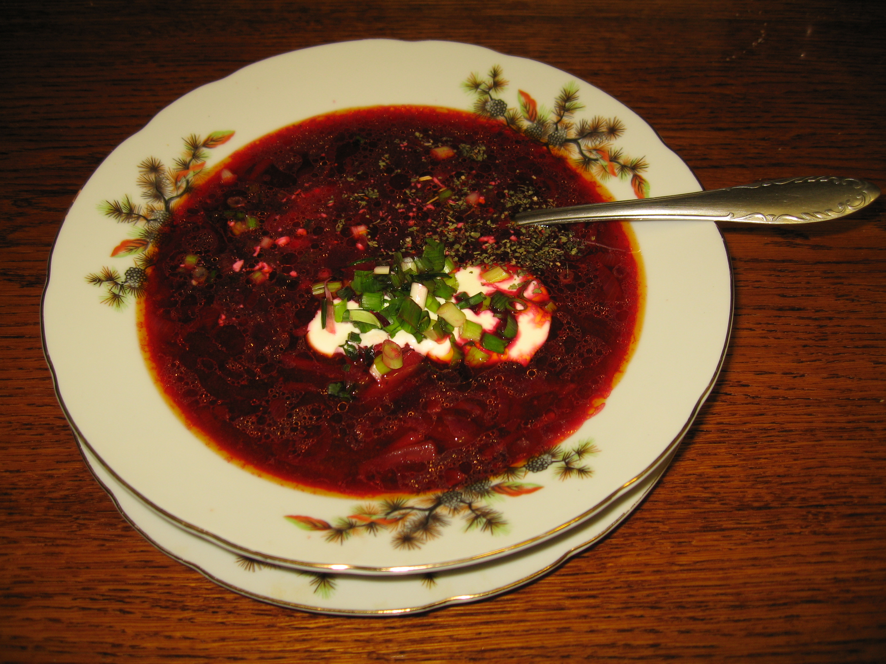 «Борщ» (классический) (основной). "Borshch" (classic) (Russian cuisine). Рецепт (recipe)